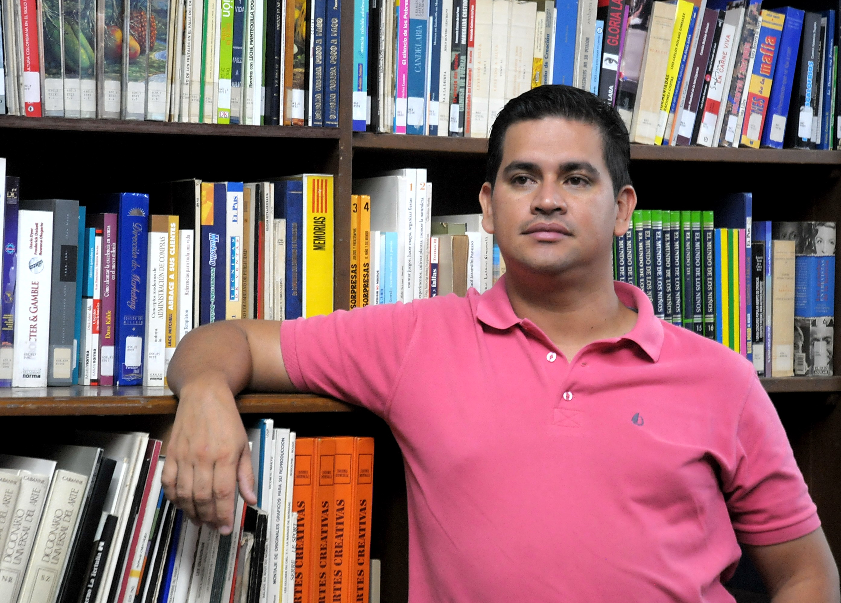 Escritor y periodista